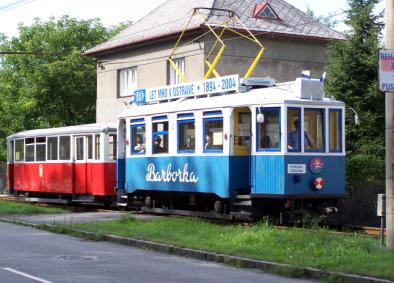 Legendární "Barborka" při jedné z jízd na trati Poruba vozovna - Zátiší. Ulice Vřesinská, srpen 2006